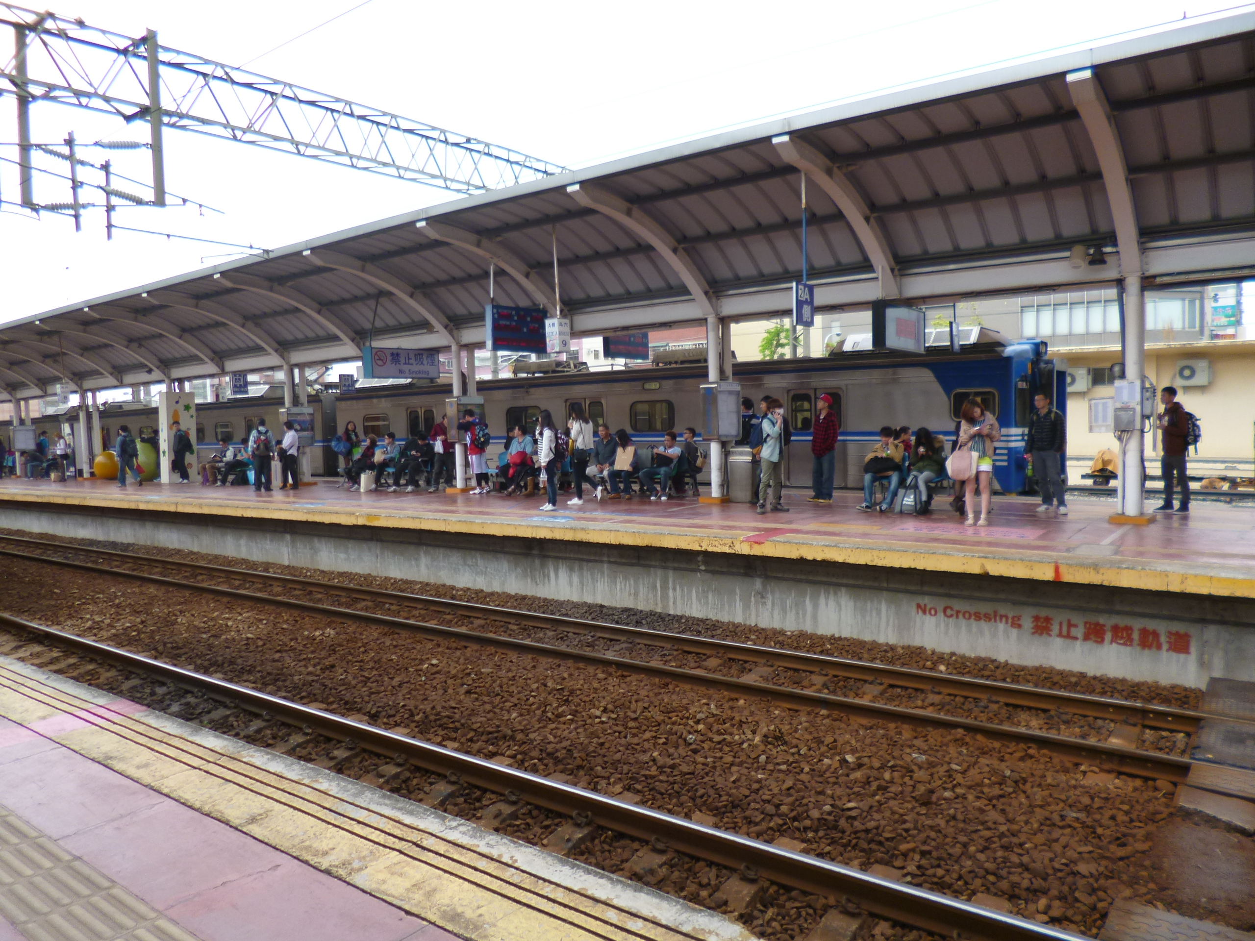 中文（台灣）: 臺鐵電聯車停靠斗六車站月台。